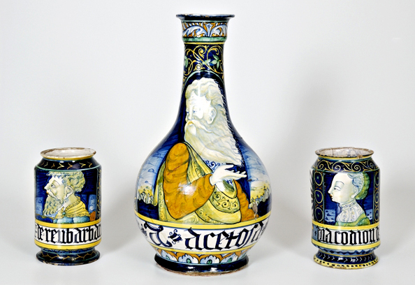 Un vaso e due albarelli della fornace Pompei. Castelli, XVI secolo, tipologia Orsini Colonna.